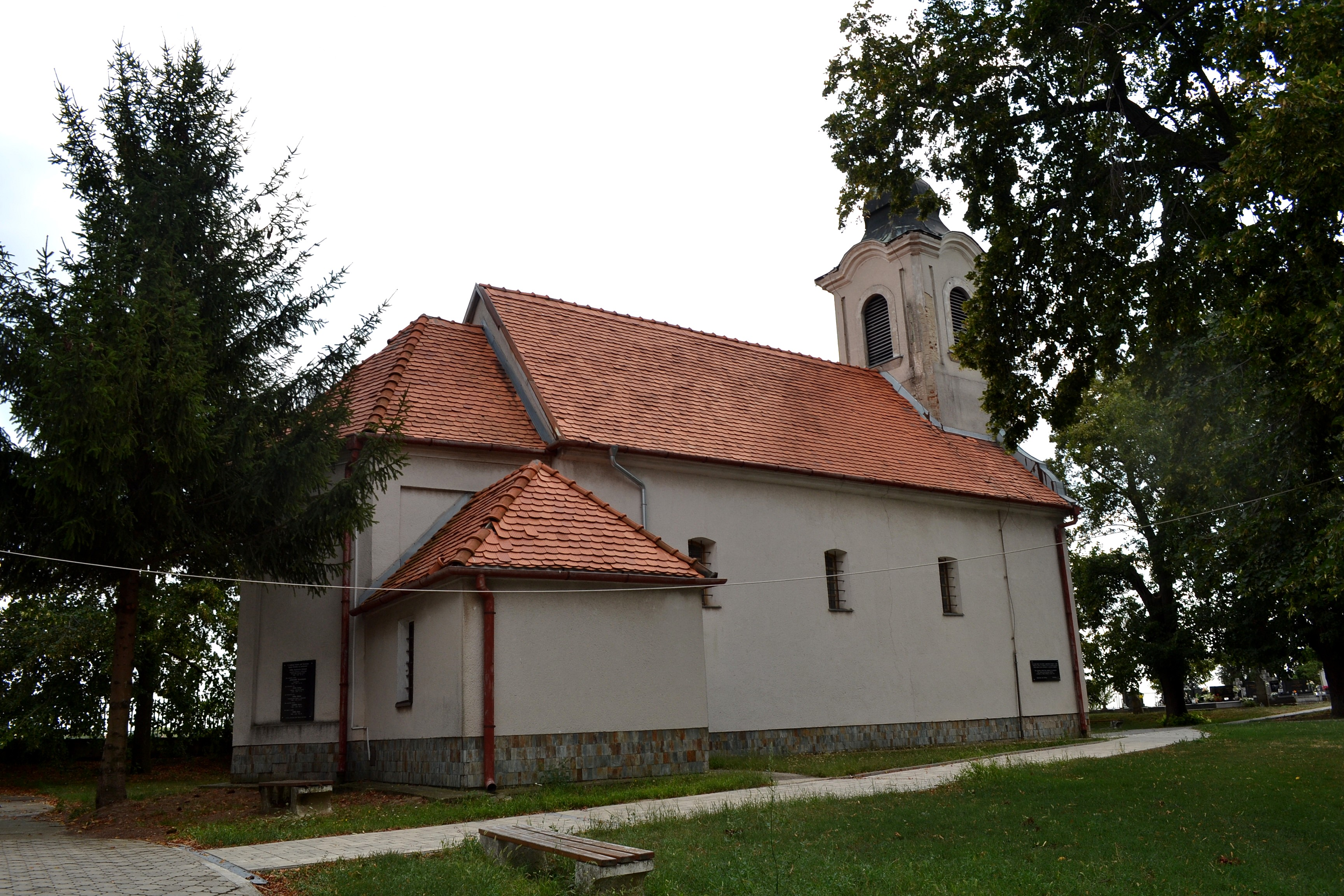 Radava (okr. Nové Zámky), Kostol svätého Ducha; celkový pohľad